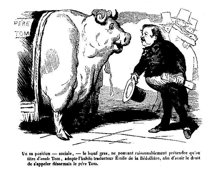 Extrait de la page 1 du Journal pour rire du 12 février 1853